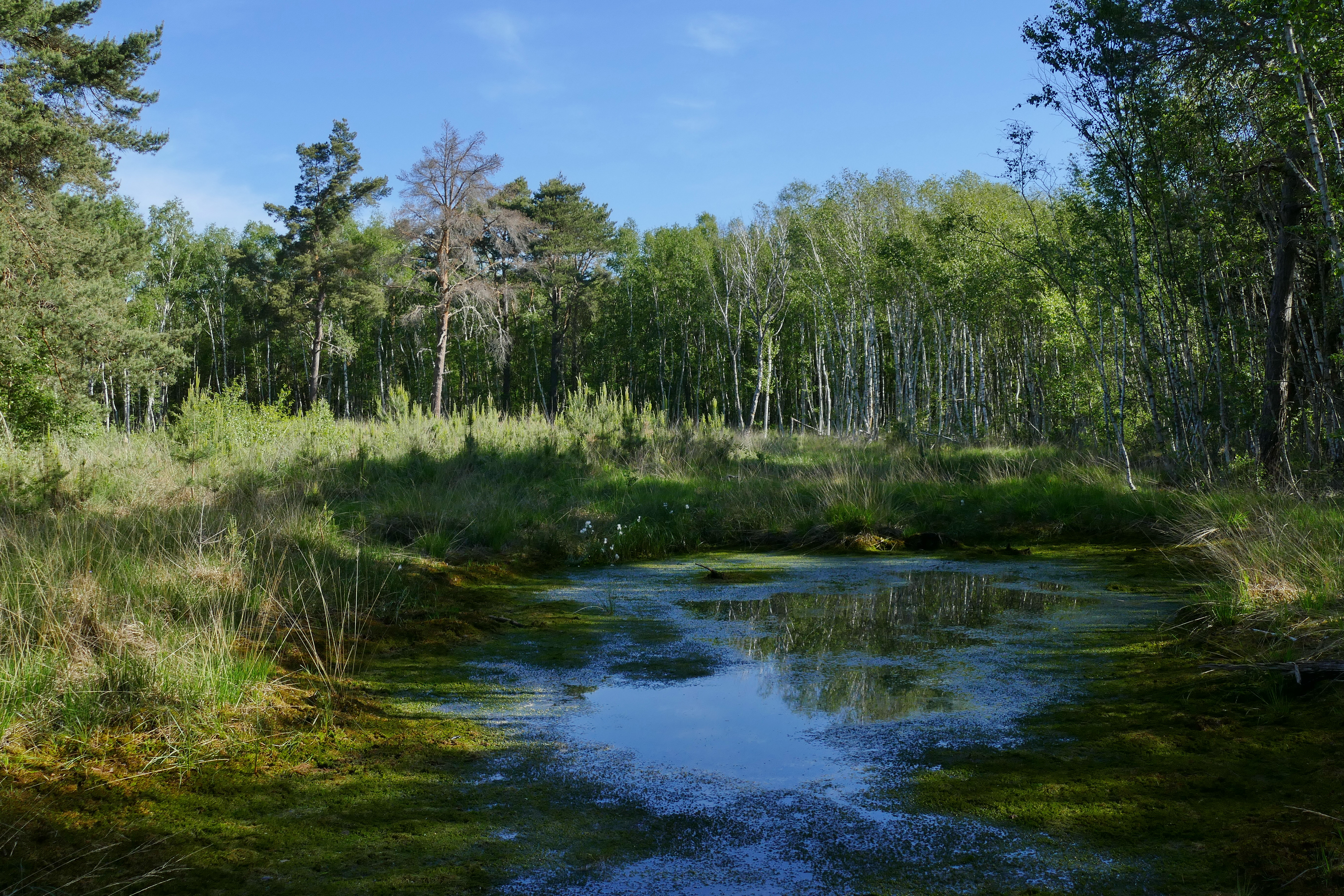 Im Altwarmbüchener Moor (Naturschutzgebiet Altwarmbüchener Moor, NSG-HA44) versucht man durch Wiedervernässung den moortypischen Charakter der Landschaft wieder - soweit möglich - herzustellen. Der Wasserstand ist zwar im trockenen Mai/Juni 2020 nicht sehr hoch, doch immer wieder fallen einzelne oder große Gruppen von abgestorbenen Bäumen auf.